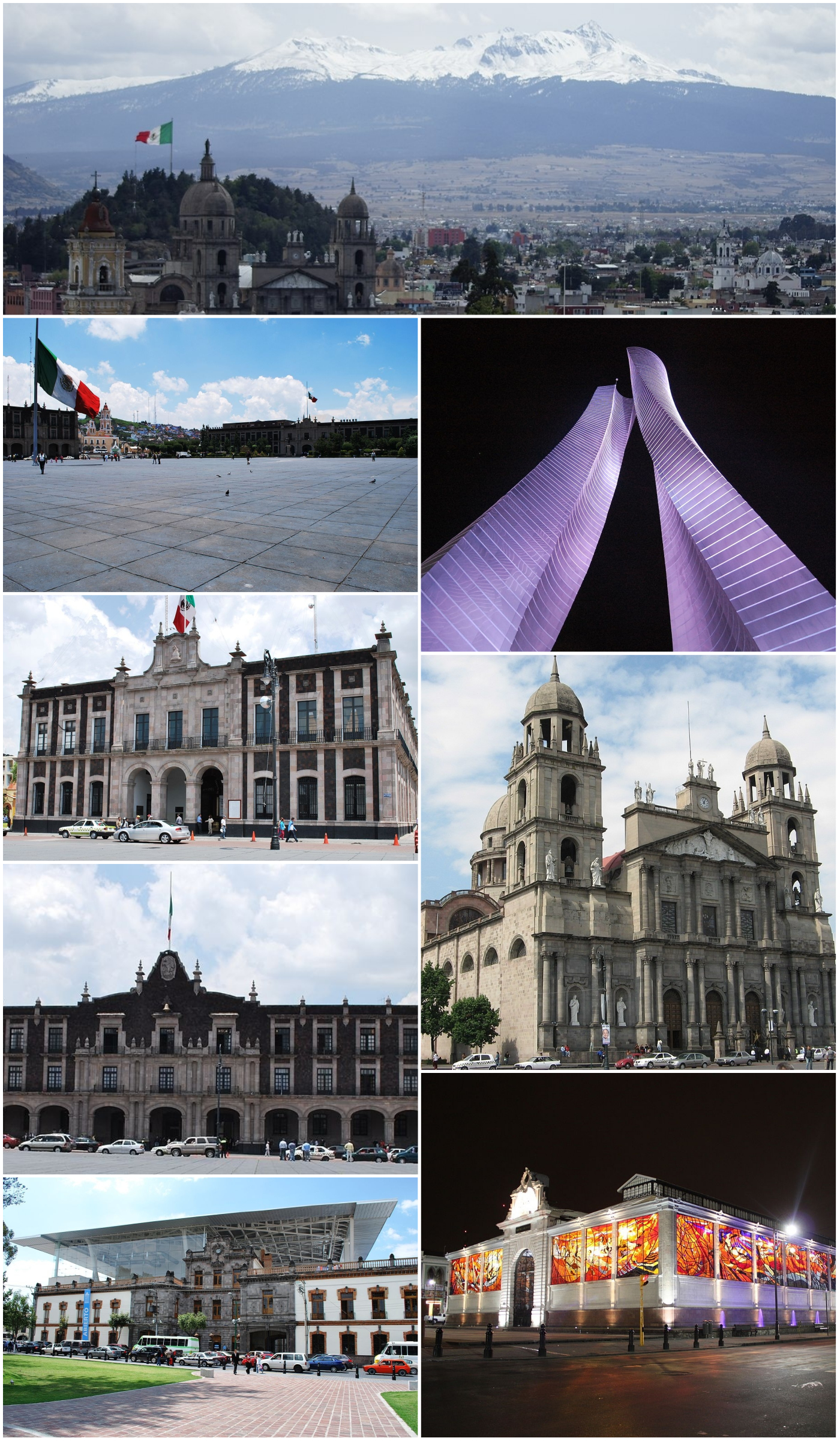 Toluca